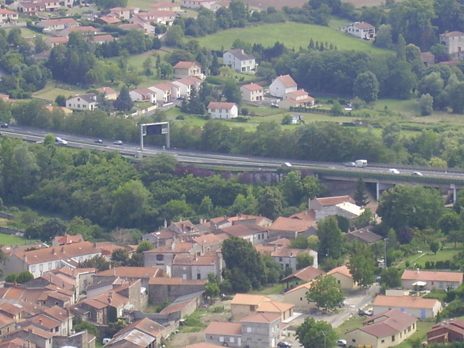 Coudes avec au premier plan le village et au deuxième plan l’autoroute A 75 de Clermont-Ferrand à Béziers depuis le donjon de Montpeyroux, Puy-de-Dôme, Auvergne, France